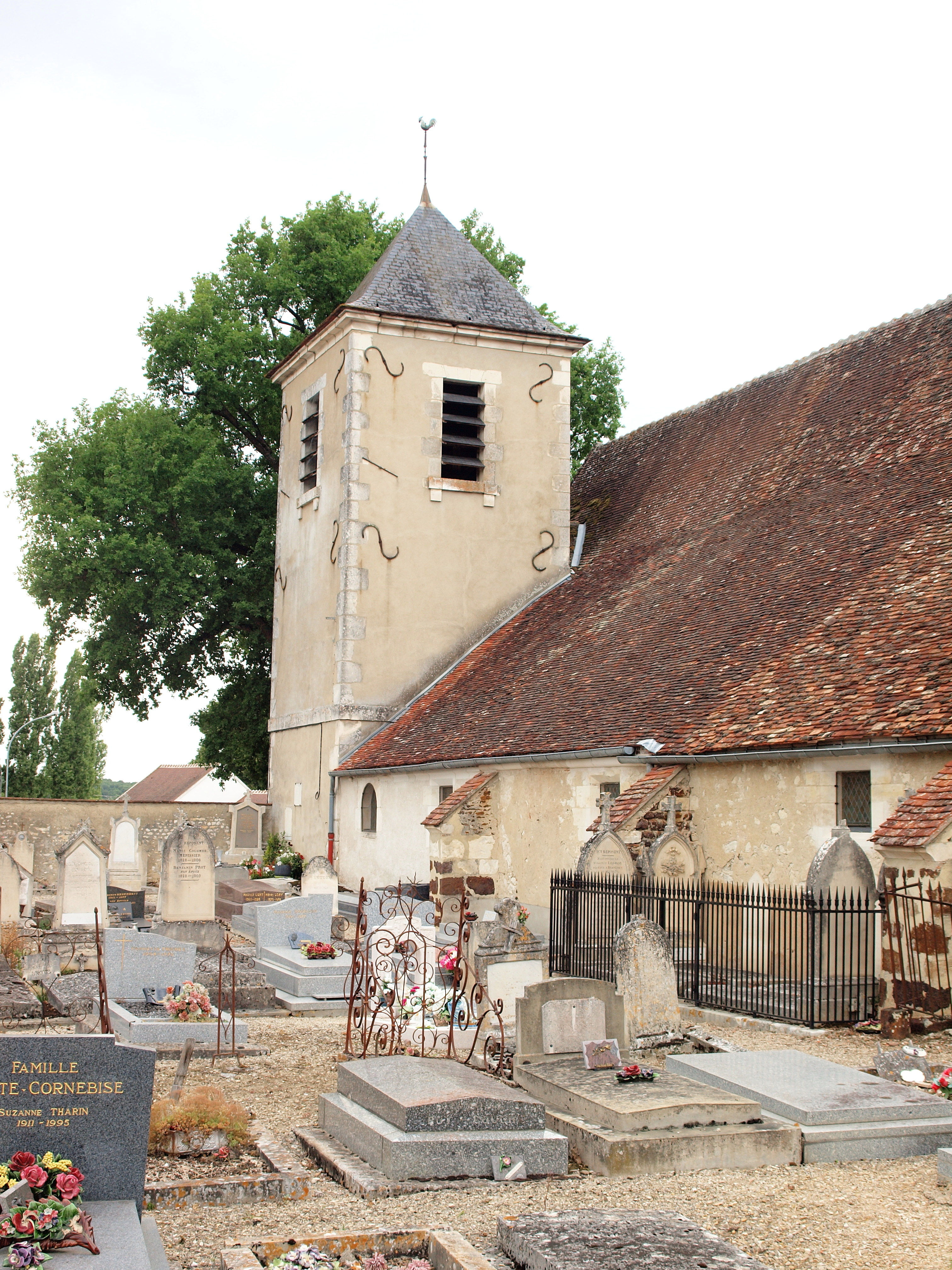 Branches (Yonne, France)